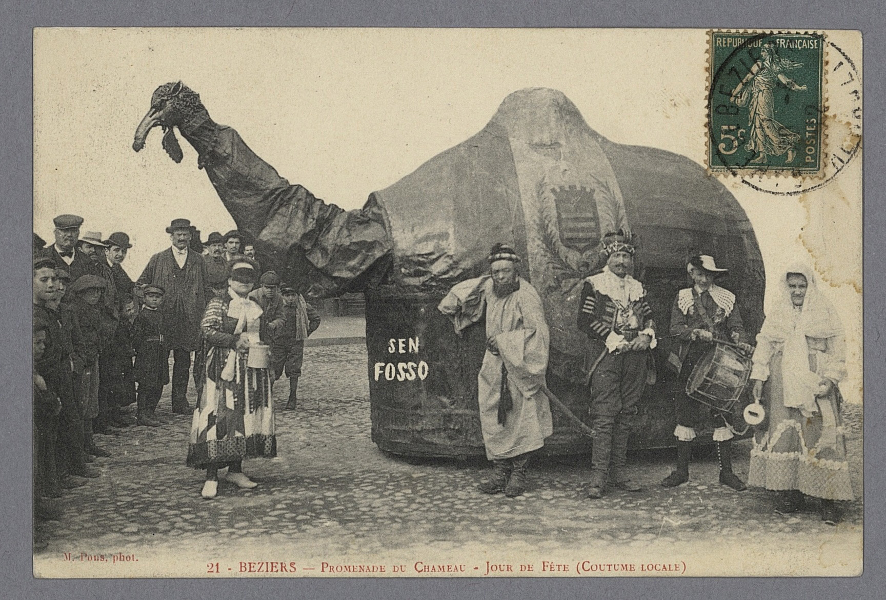 Beziers promenade du Chameau - Archives départementales de l’Hérault - FRAD034-50FI-0120-00001